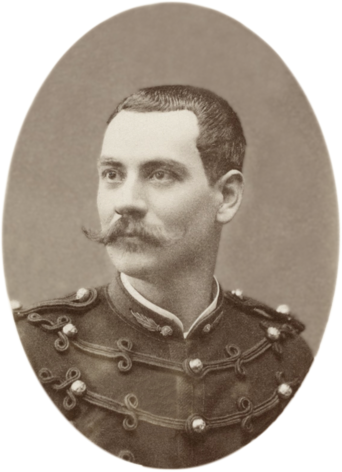 Eugène Bonnier (1856 - 1894), Officier français, géographe et explorateur de la Nouvelle-Calédonie, du Sénégal, du Niger et du Mali où il trouva la mort au combat.